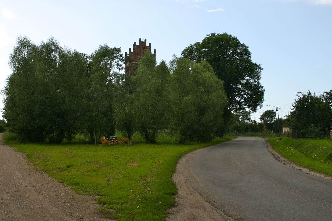 Parys